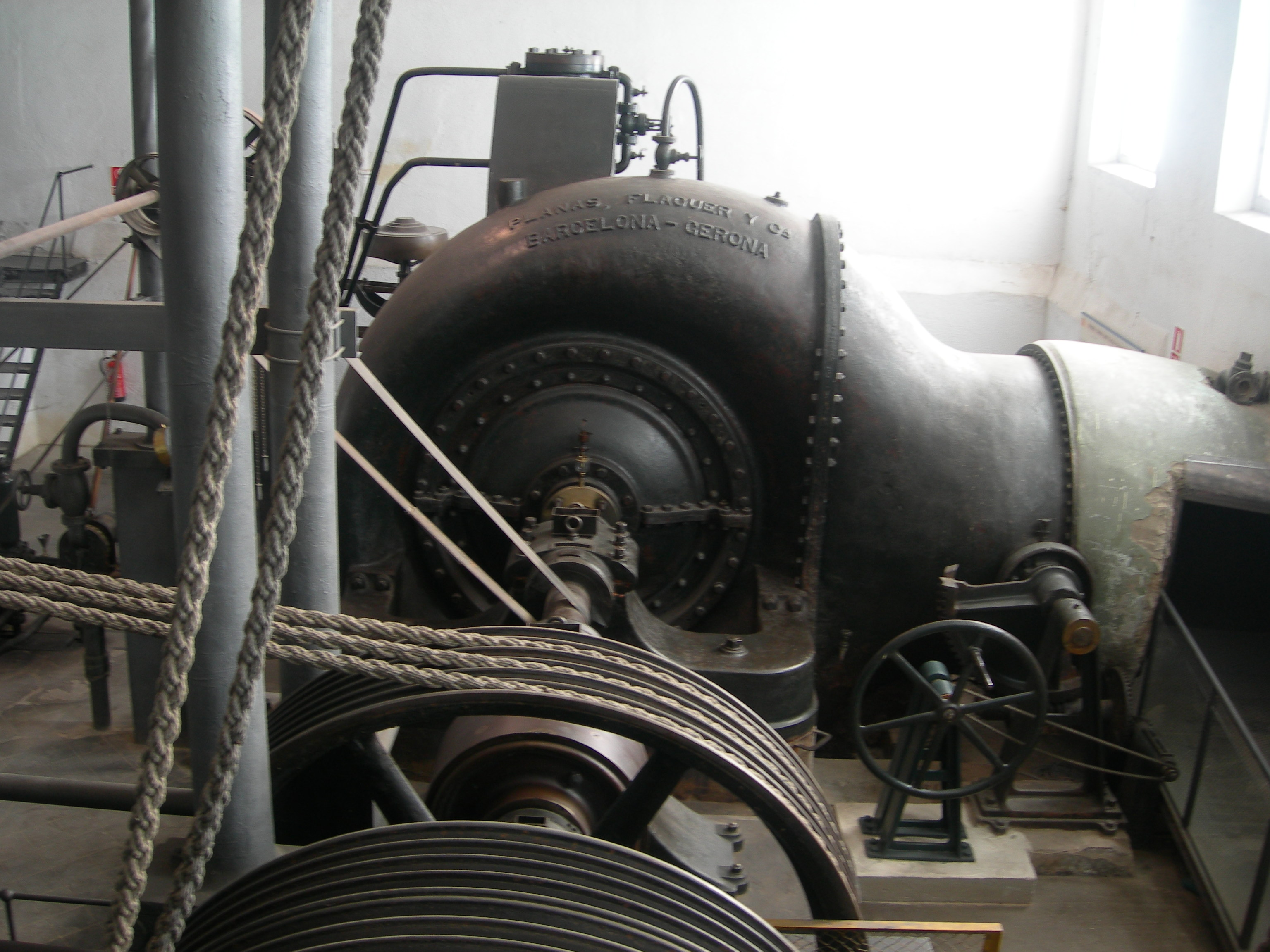 Gran turbina de l'antiga fàbrica de la Colònia Sedó (Esparreguera).